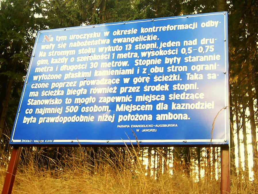 tablica w Jaworzu upamietniająca tajne nabożenstwa ewangelików